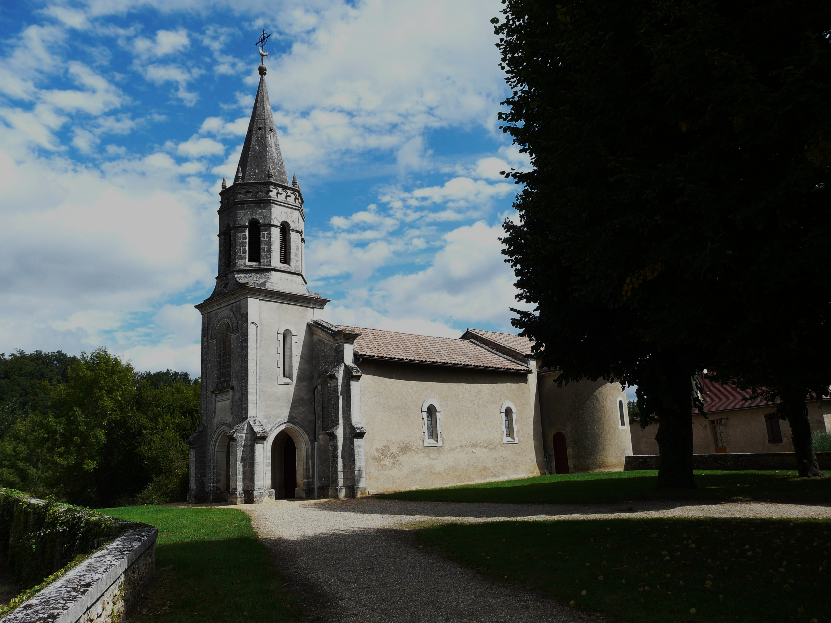 L'église Saint-Côme et Saint-Damien, Bourgnac, Dordogne, France